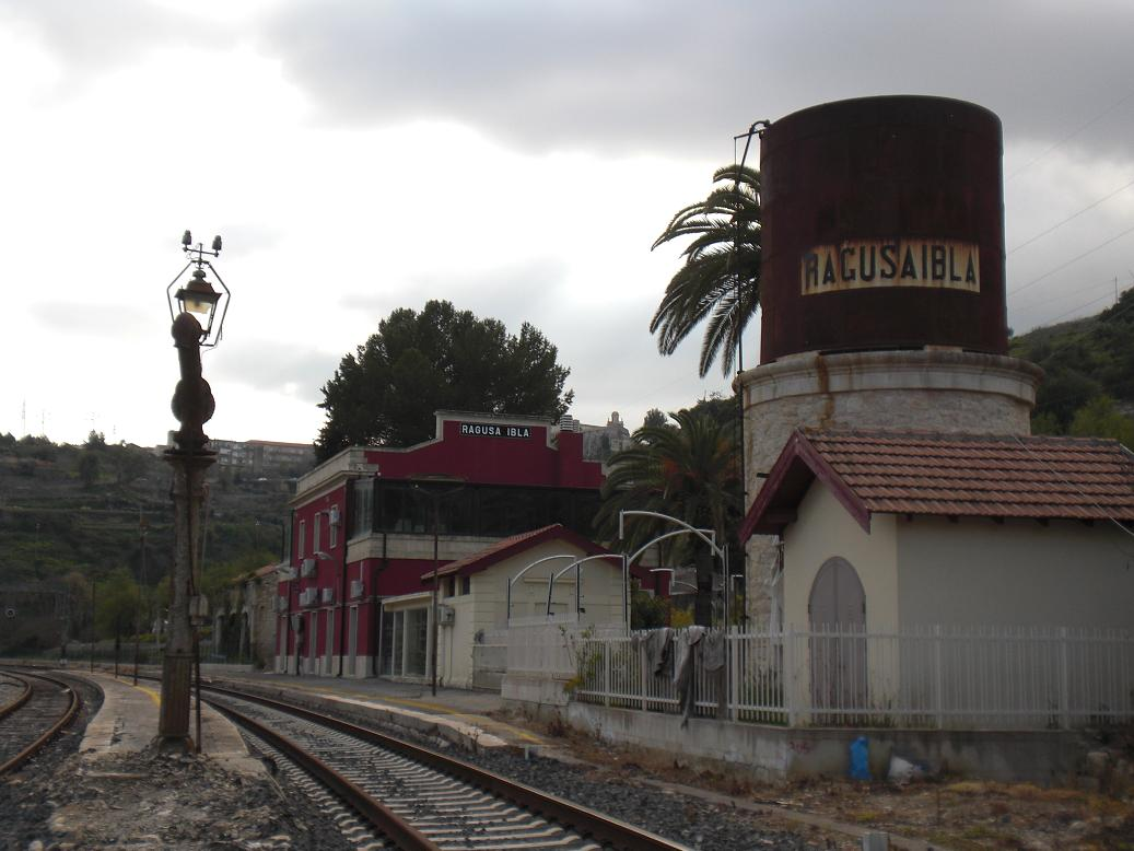 Stazione di Ragusa Ibla. Lato binari del fabbricato viaggiatori e torre dell'acqua con insegna